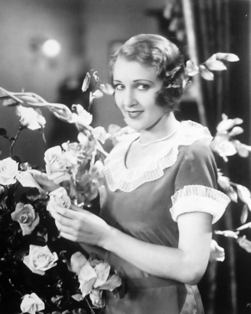 Foto di scena di Rita Flynn in "The Public Enemy"